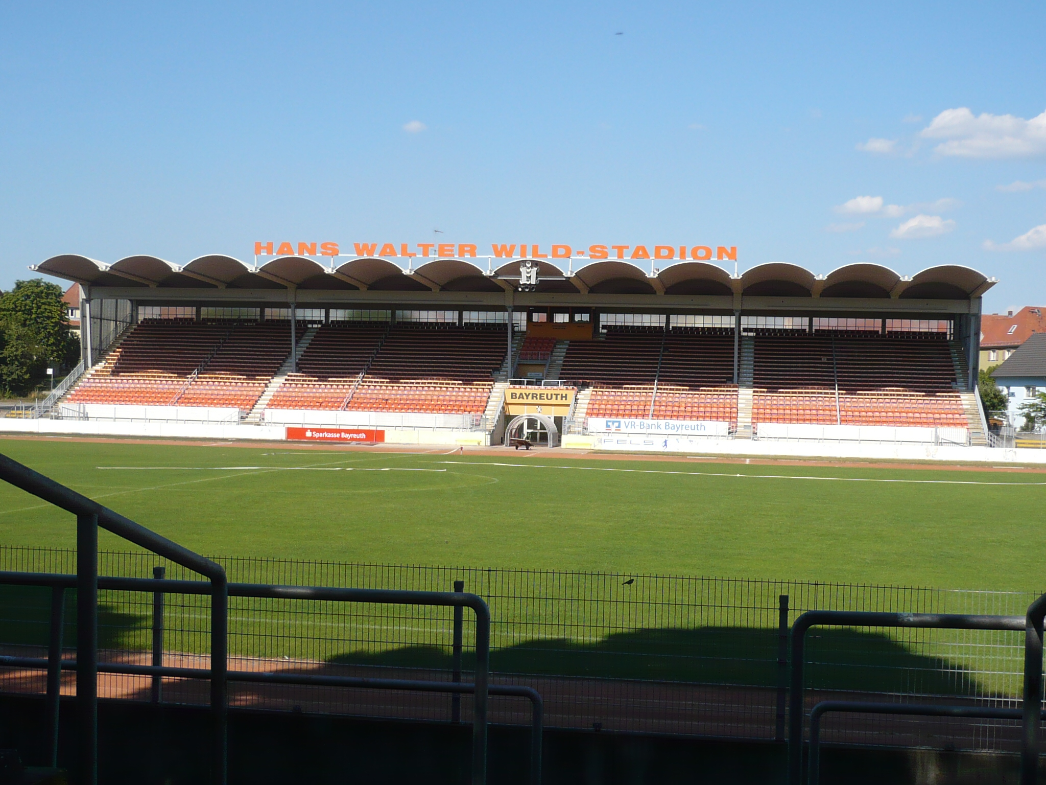 Städtisches Stadion Bayreuth